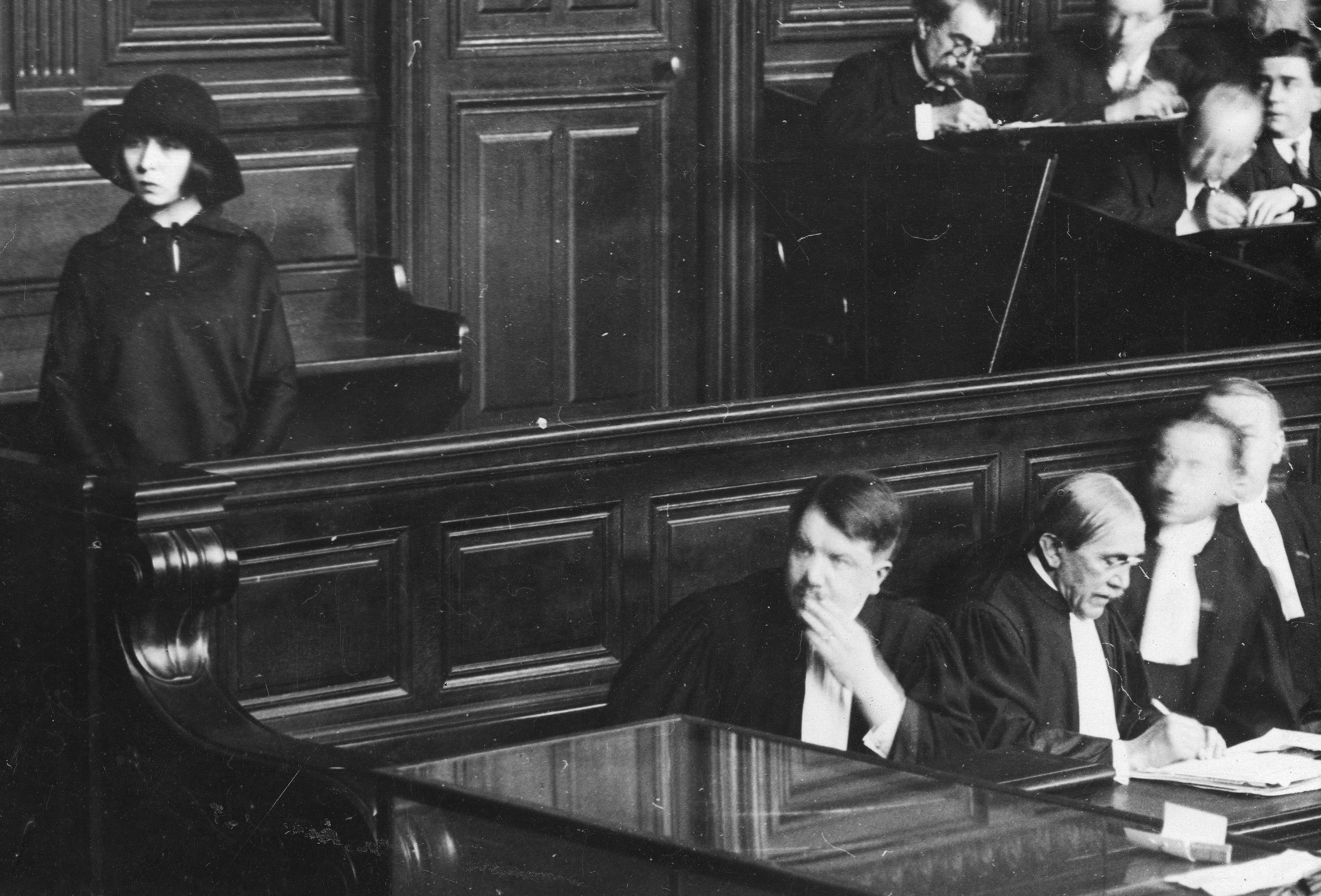 zdjęcie z archiwum Kurjera Codziennego